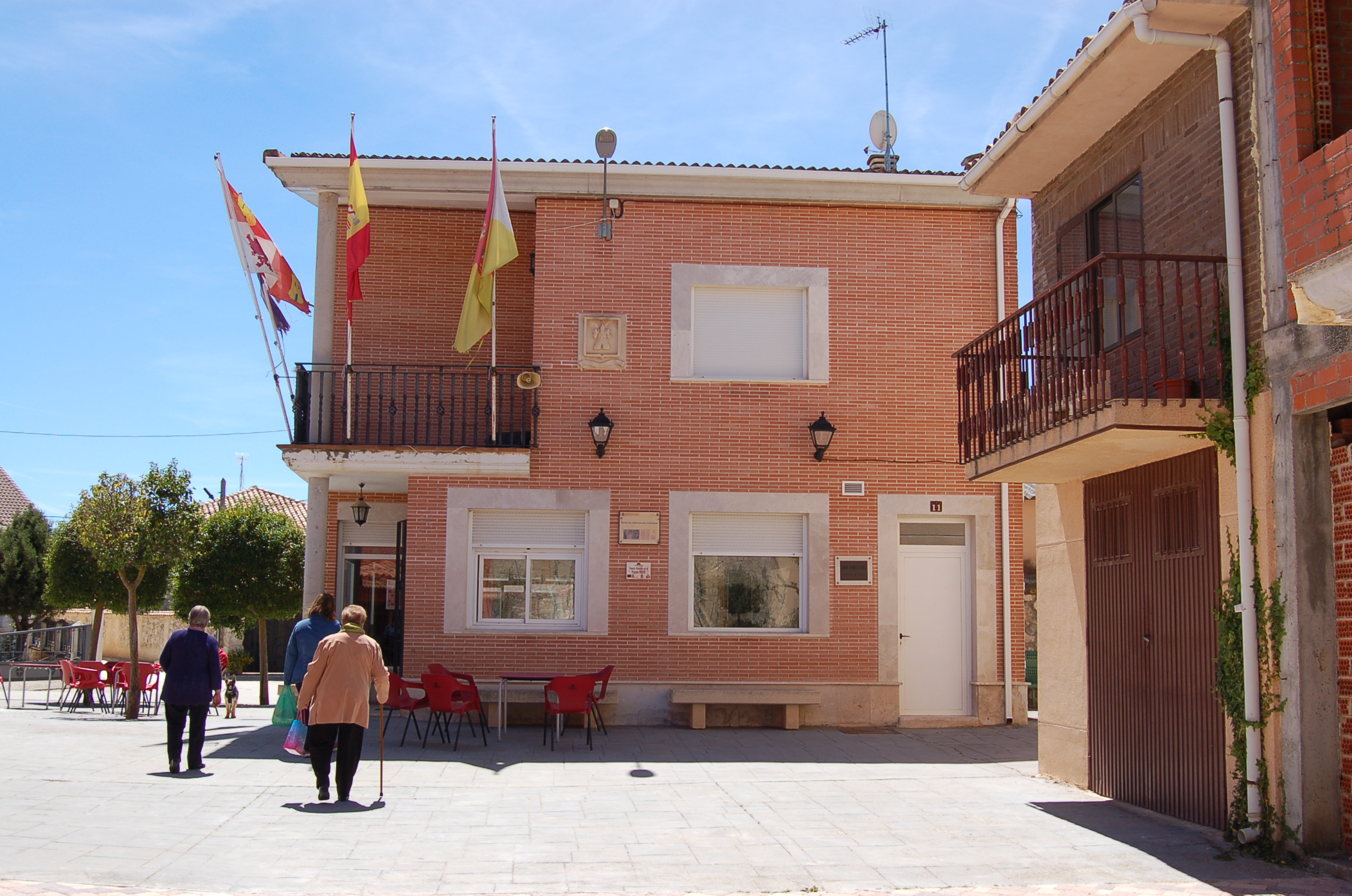 Casa consistorial de Pedrosa de Duero